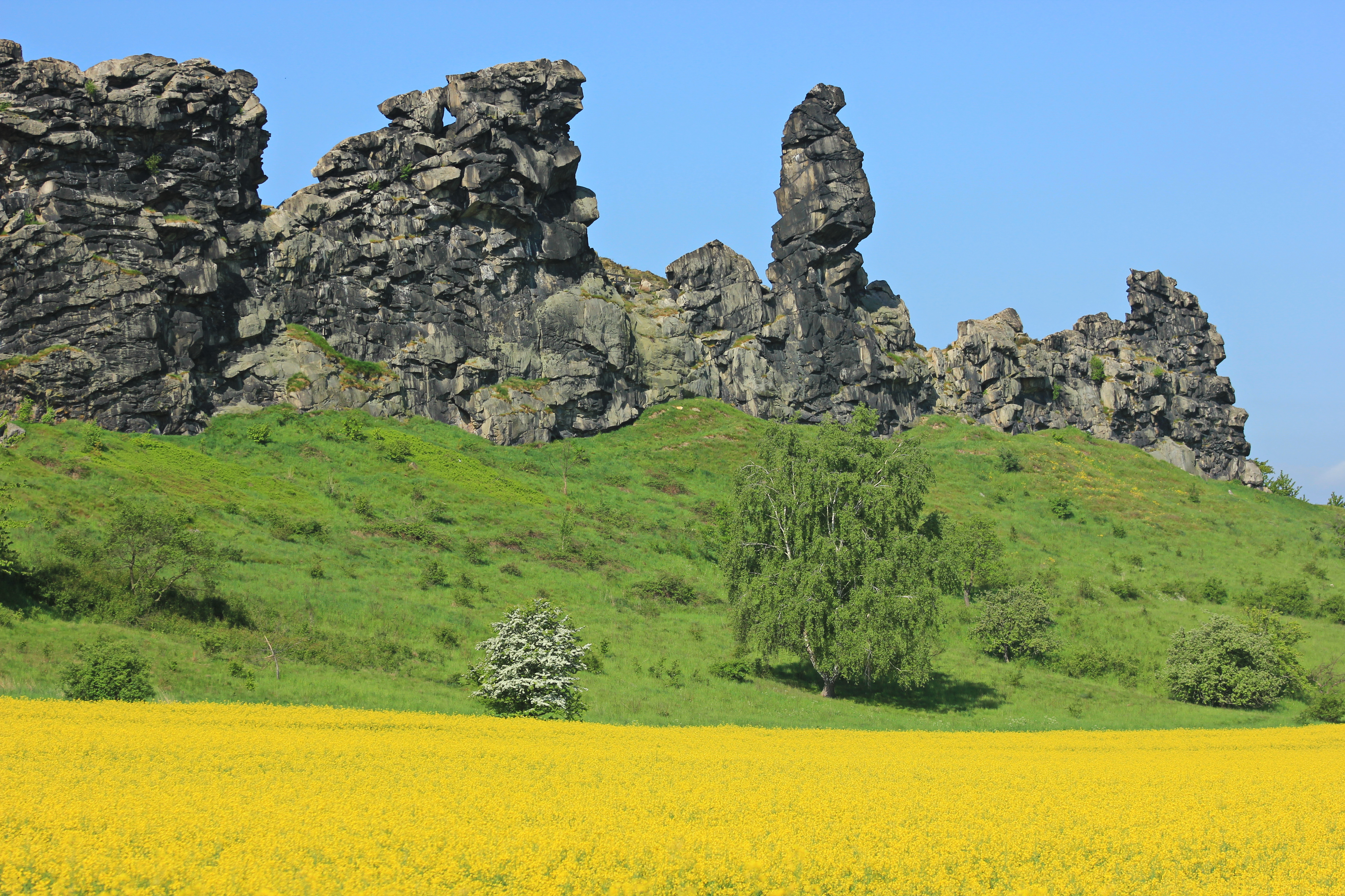 Die Teufelsmauer im NSG 64 „Teufelsmauer und Bode nordöstlich Thale“ südwestlich von Weddersleben.